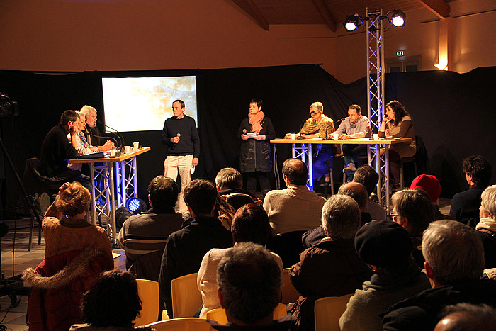 Mendialdeko kantonamenduari buruzko mahai ingurua, 2015ean Urdiñarben sei hautagai.